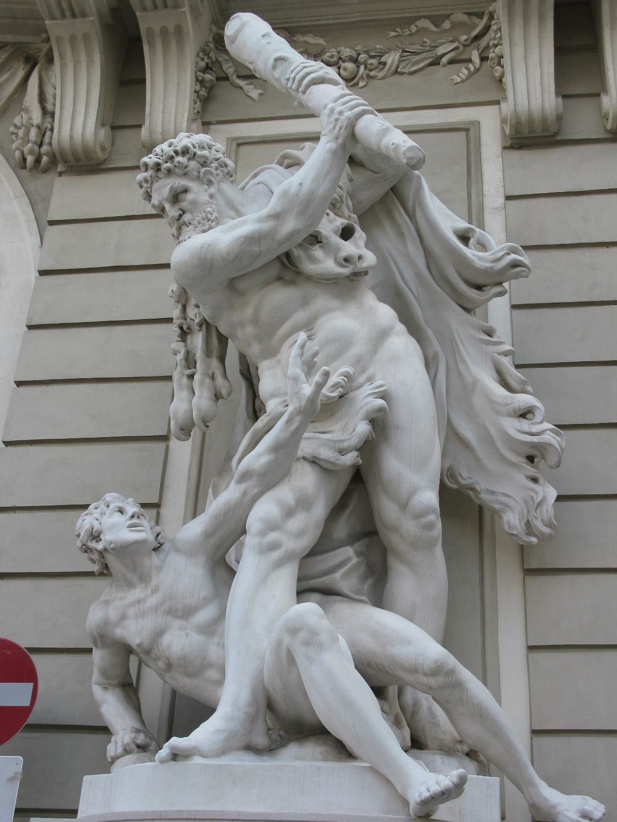 Fassade Reichskanzlei, Herakles und Busiris, 2009